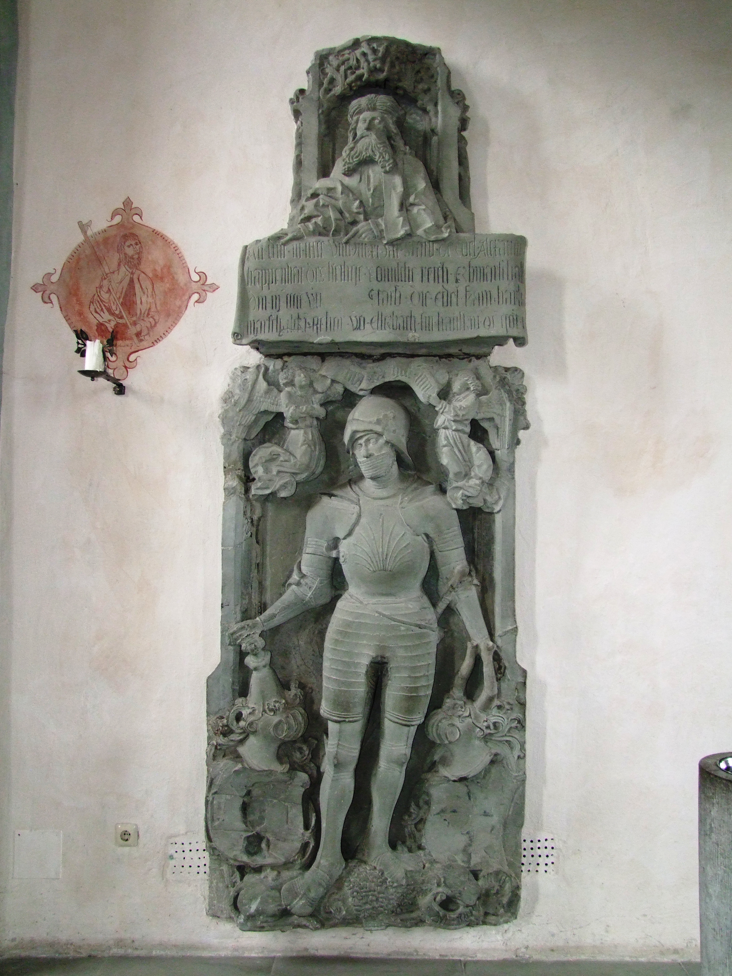 Pfarrkirche St. Philipp und Jakob im oberschwäbischen Bad Grönenbach